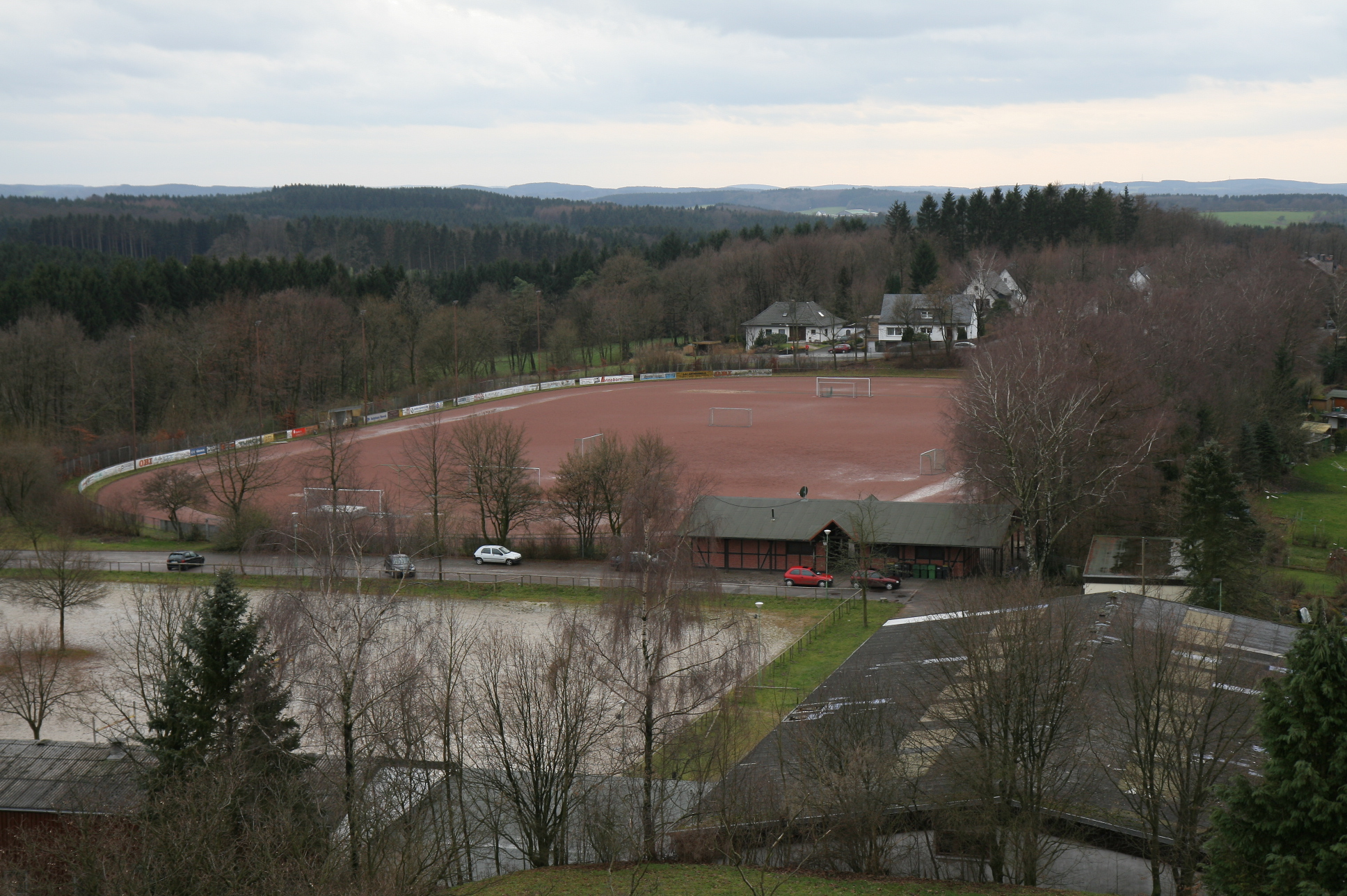 Blick vom Aussichtsturm Karlshöhe auf den Franz-Dobrikat-Sportplatz in Halver.